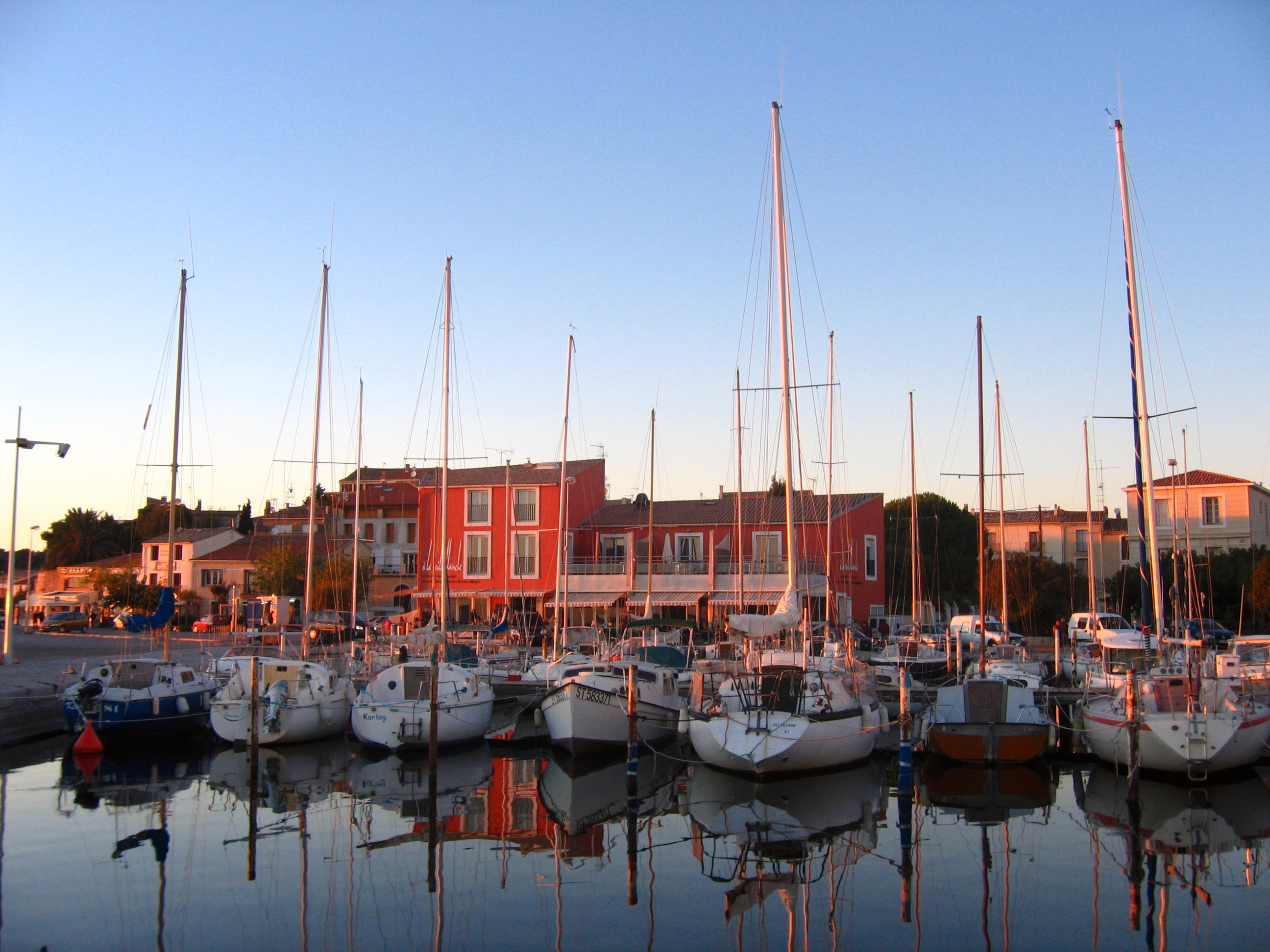 Port de Bouzigues, dans le département de l'Hérault et la région Languedoc-Roussillon.